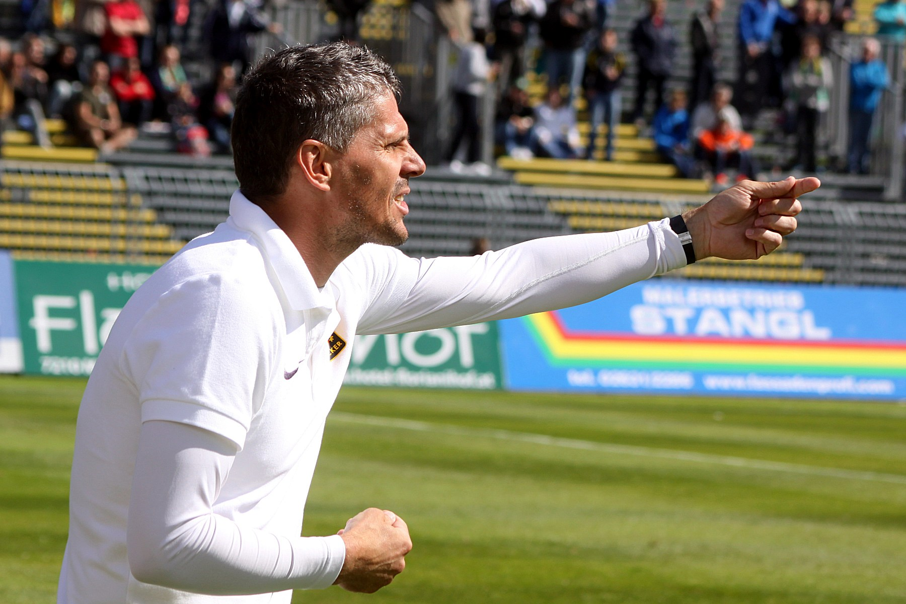 Meisterschaftsspiel der österreichischen Bundesliga: SV Mattersburg gegen FC Admira Wacker Mödling am 26. Mail 2013 (0:0)] im Mattersburger Pappelstadion.] - Das Foto zeigt den Trainer des FC Admira Wacker Mödling Dietmar Kühbauer.